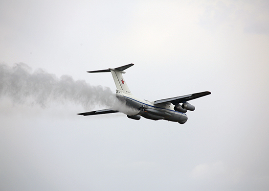 Военно-транспортный самолет Ил-76 производит тушение пожаров в Сибири